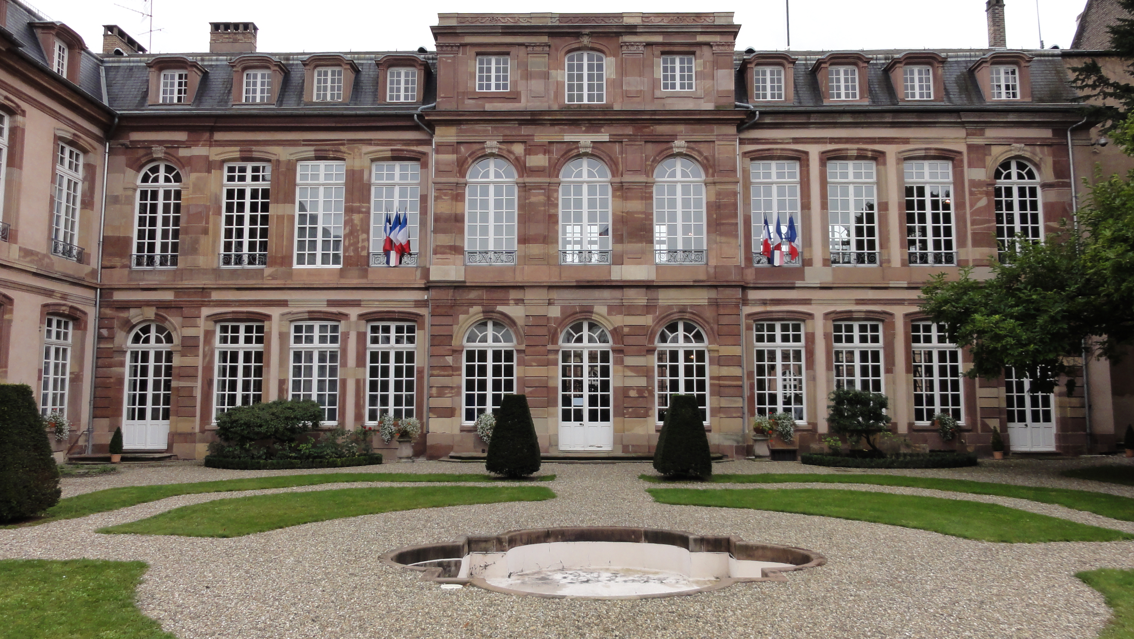 Alsace, Bas-Rhin, Strasbourg, Ancien Hôtel des Princes des Deux-Ponts (Zweibrücken) (1743), puis Hôtel du Gouverneur militaire. It is indexed in the Base Mérimée, a database of architectural heritage maintained by the French Ministry of Culture, under the references PA00085054 and IA67009262 .